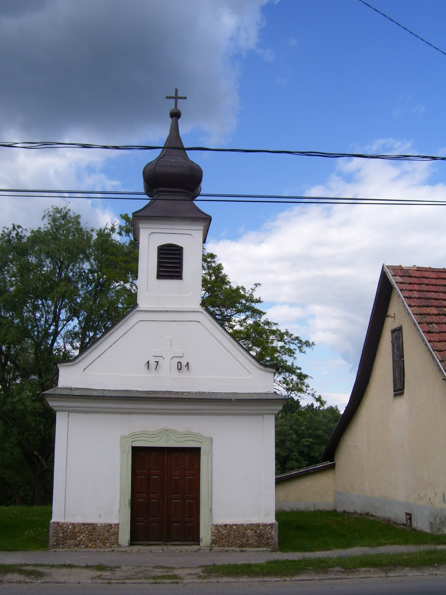 Dunabogdány - Szt. Rozália-kápolna, késő barokk, 1800 körül. Az orommezőben a párkány felett 1701-es évszám. Dunabogdány, Kossuth u. _11-es főút